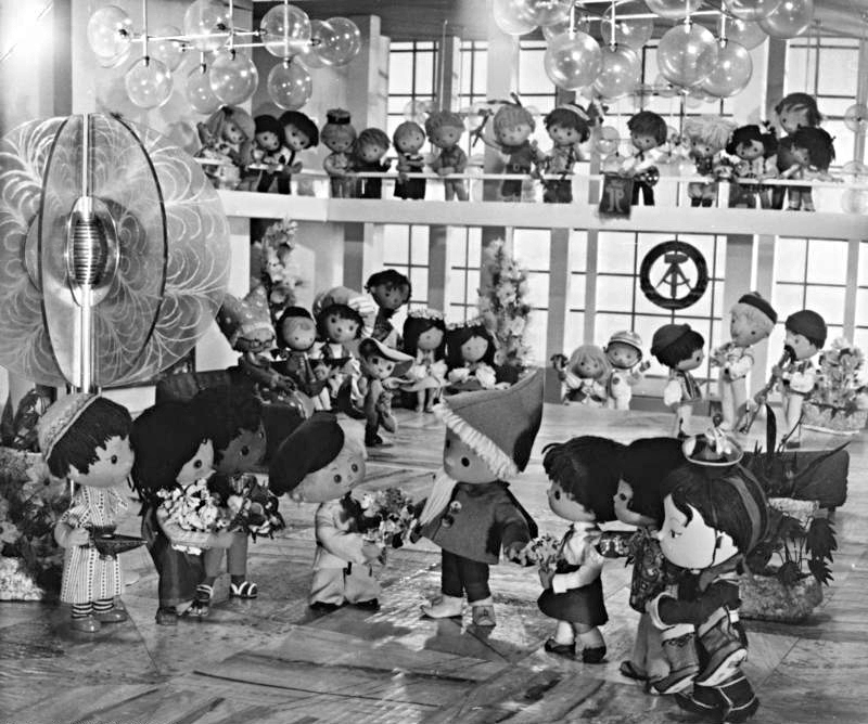 ADN-ZB/Deutsche Demokratische Republik / 28.11.1984 / Sandmännchen beging 25. Geburtstag Die über die Landesgrenzen hinaus bekannte Figur des Kinderfernsehens der DDR, das Sandmännchen - hier im nachgebildeten Berliner Palast der Republik- erfreut seit 1959 allabendlich Mädchen und Jungen mit einem abwechslungsreichen Programm vor dem Schlafengehen. Das Adlershofer Fernsehteam um Regisseur Gerhard Behrendt - dem "Vater" des Sandmännchens - benötigt Einfallsreichtum und Phantasie, um in seinem Mahlsdorfer Trickfilmstudio diese anspruchsvolle Arbeit vorwiegend für seine kleinen Zuschauer zu gestalten. Bisher entstanden 265 verschiedene Vor - und Abspanne. Der Aufwand ist kein geringer. 25 Einzelaufnahmen sind nötig, um eine Sekunde Trickfilm zu produzieren. Eine dreiminütige Abendgrußhandlung besteht aus 4500 Bildern. Ungefähr vier Wochen dauert es, bis eine Rahmenhandlung fertig ist.